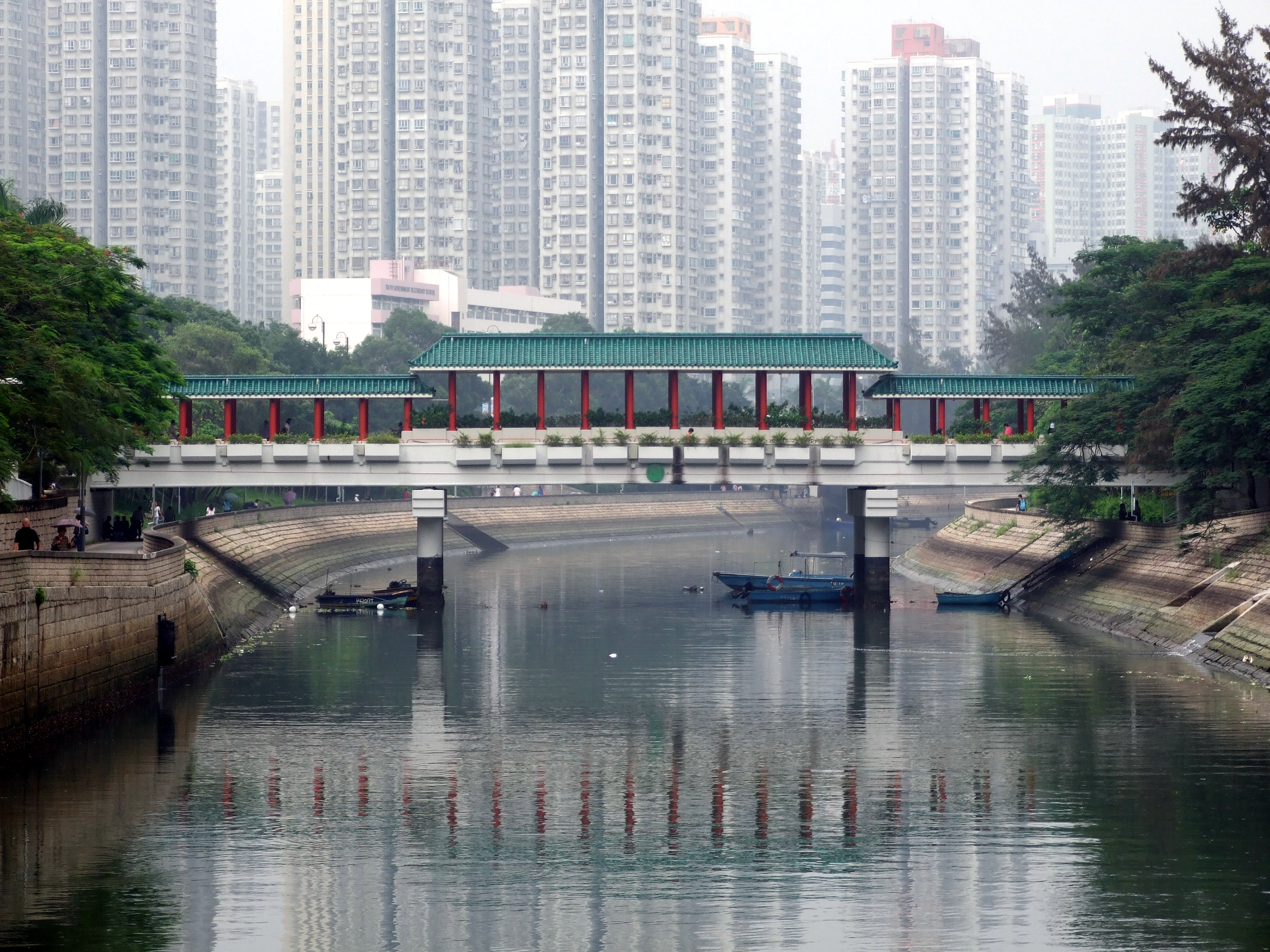 中文（香港）: 第三代中國式廣福橋。